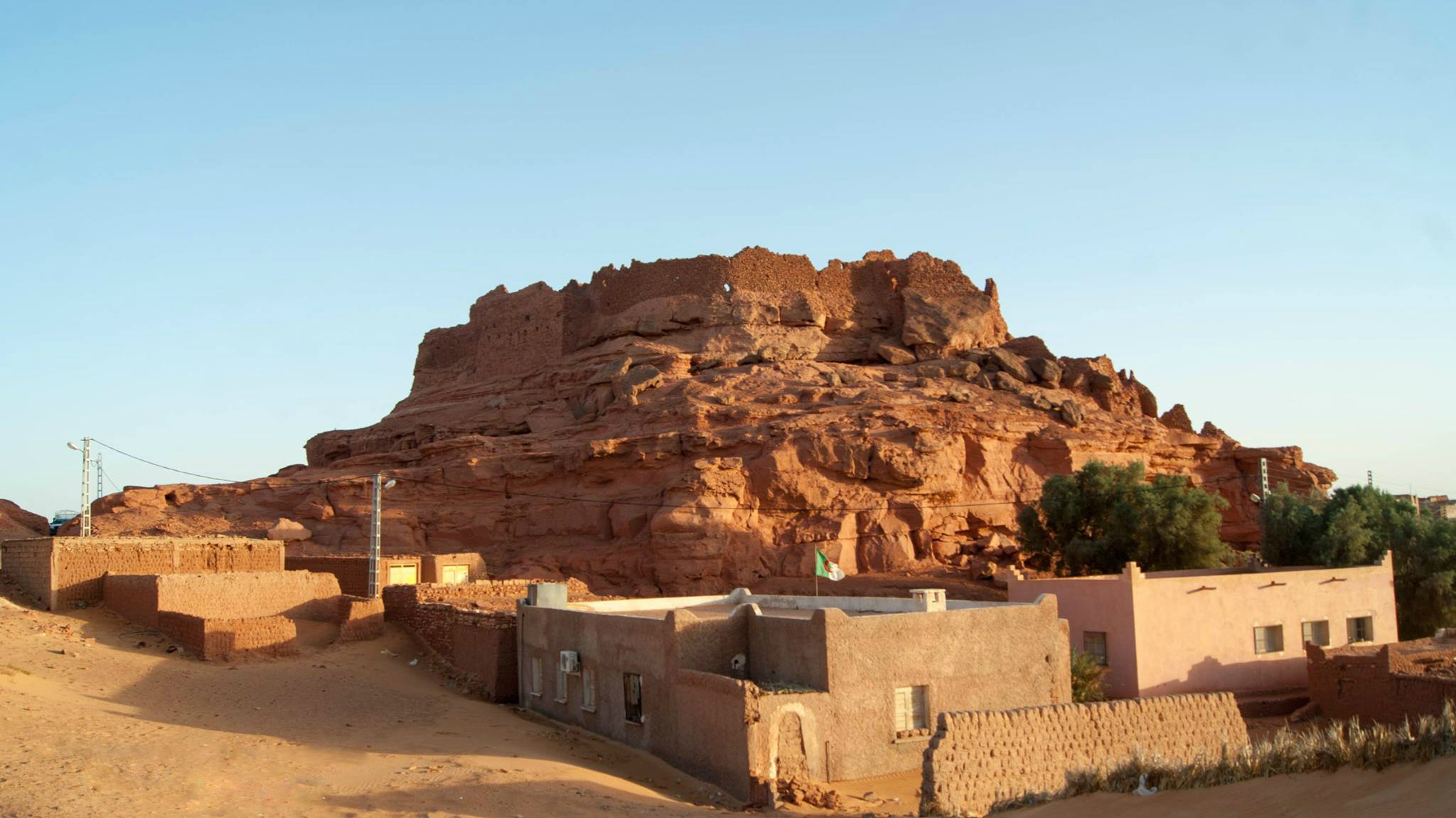 قصر يغزار تيميمون الجزائر